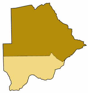 Mappa del vicariato apostolico di Francistown, in Botswana. Lavoro personale, eseguito a partire da questa immagine di Commons. Fonte per i confini delle diocesi: Church Map in SACBC Guida delle missioni cattoliche 2005, a cura della Congregatio pro gentium evangelizatione, Roma, Urbaniana University Press, 2005 Categoria:Chiesa cattolica in Botswana